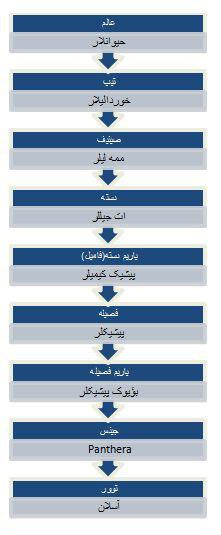 تۆرکجه: اسلان لار